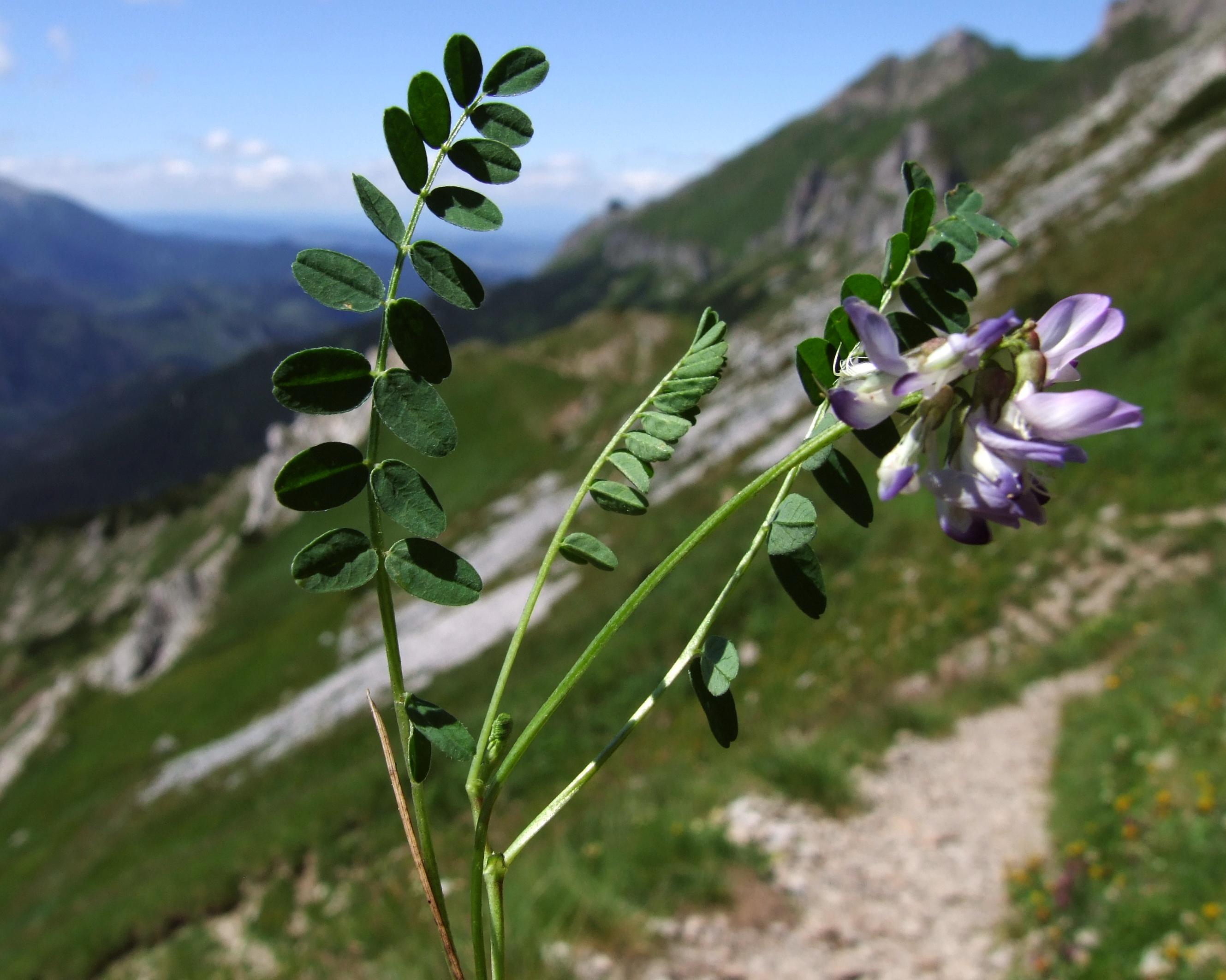 Hedysarum hedysaroides